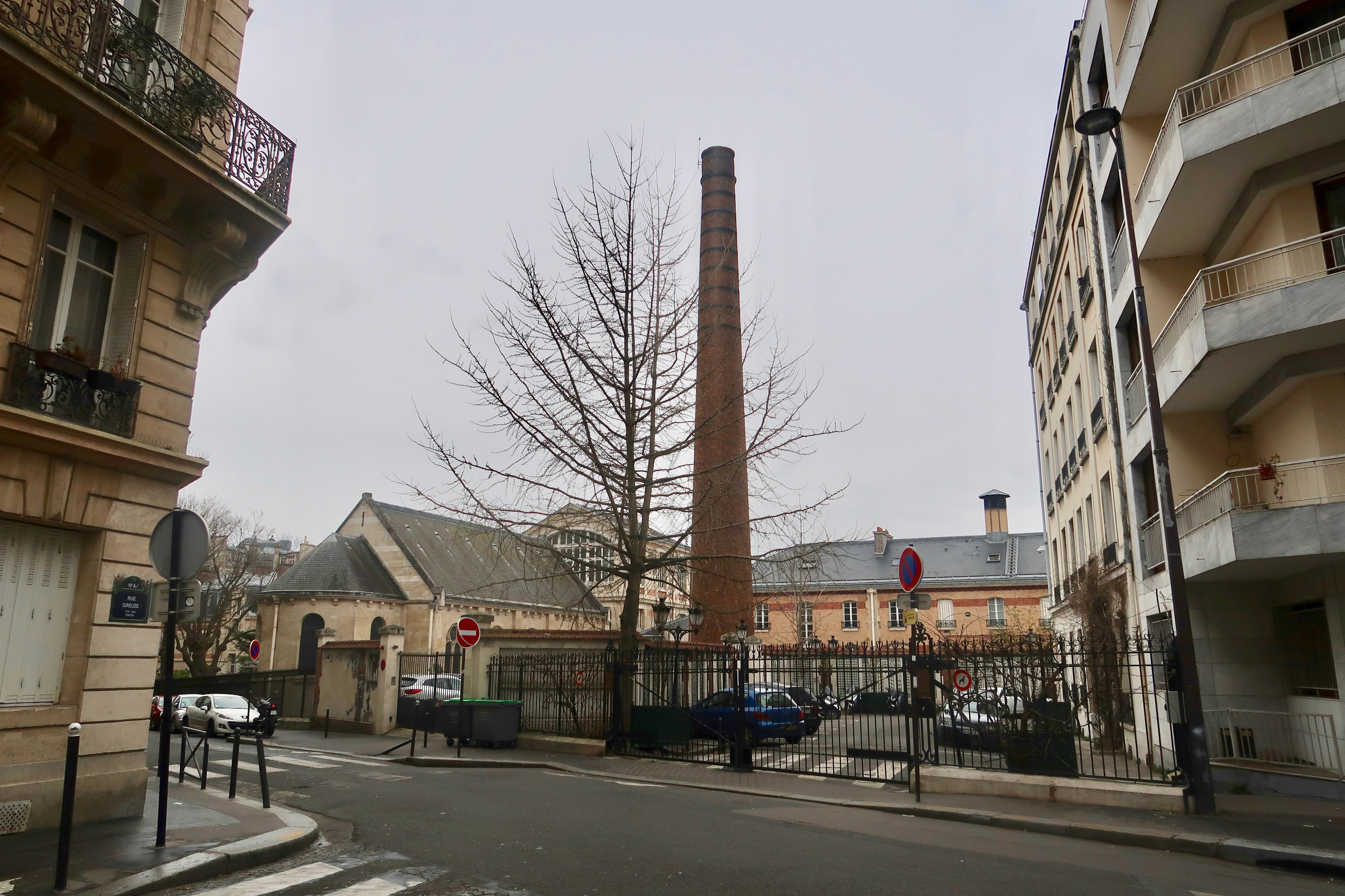 Cheminée du lycée Janson-de-Sailly (Paris, 16e), vue depuis la rue Decamps.